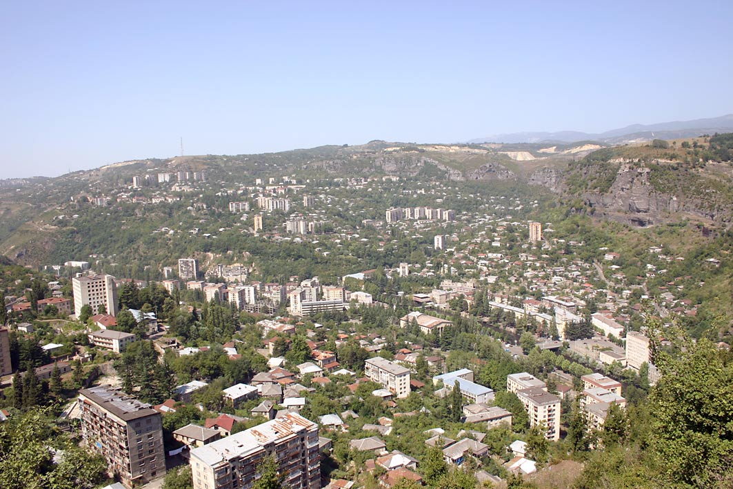 Tschiatura (ჭიათურა) - Blick in südwestliche Richtung